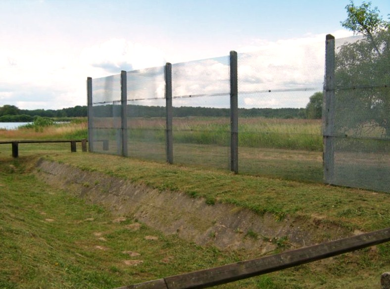 KFZ-Sperrgraben und äußerer Zaun an der Grenzanlage Stresow, Wüstung des ehemaligen Dorfes Stresow im heutigen Landkreis Stendal, Gemeinde Aulosen